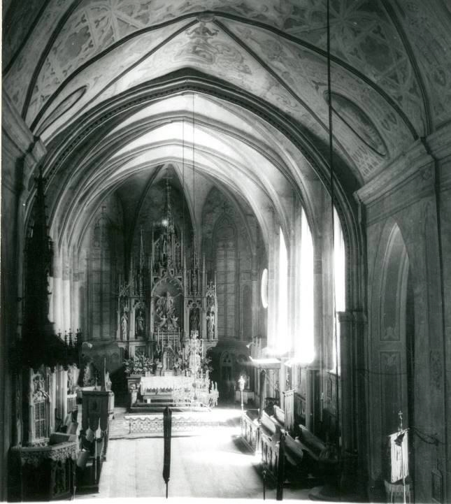 kostol pred úpravami 1956, hlavna loď